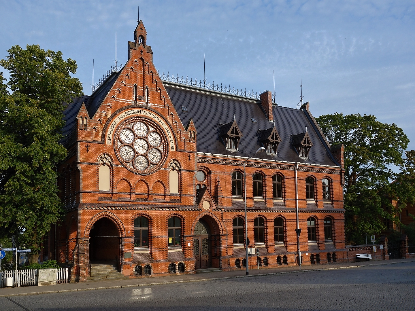 Friderico-Francisceum-Gymnasium